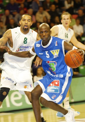 Brest vs asvel